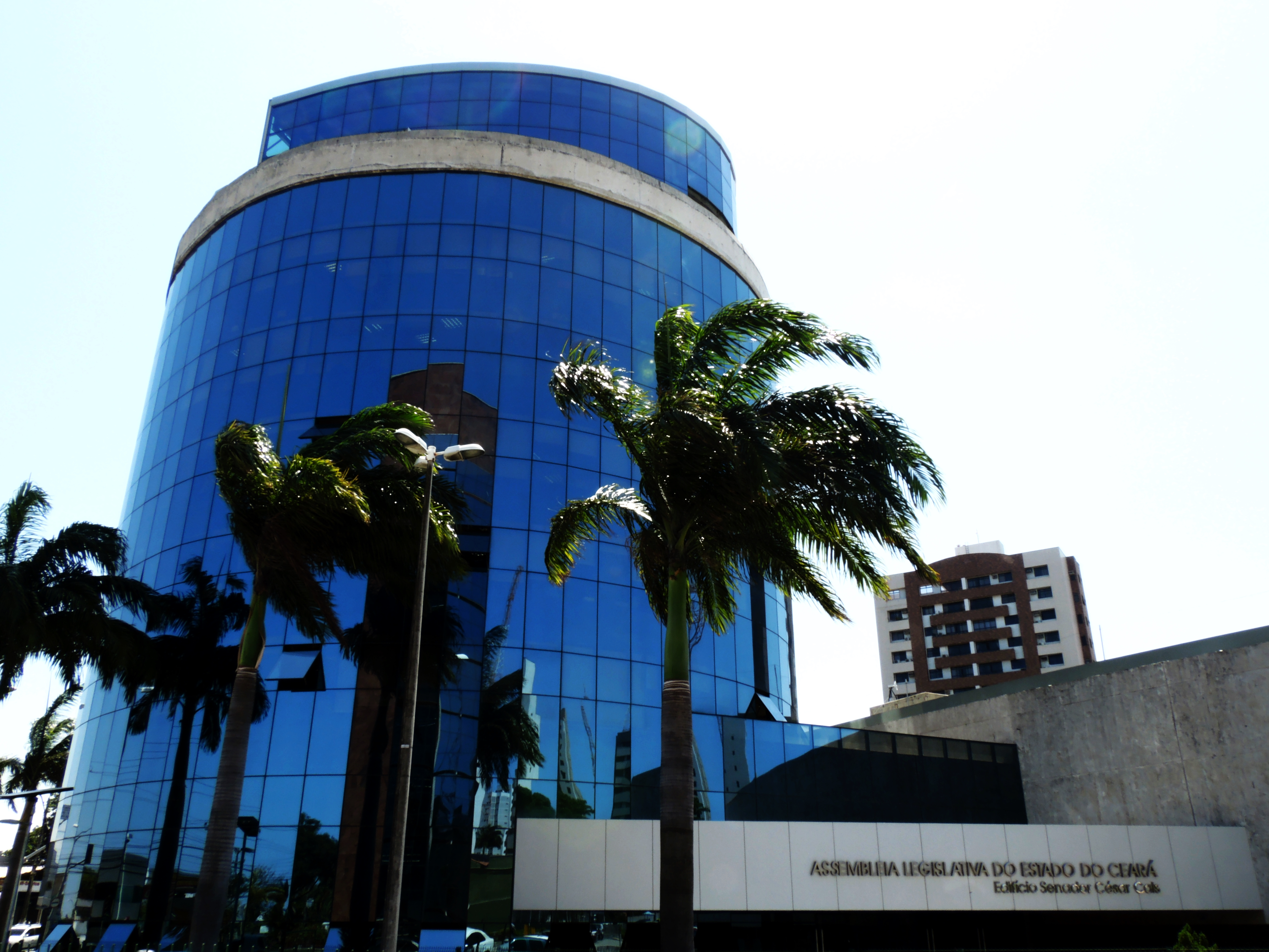 Antigo edifício da Assembléia Provincial, atual sede da Assembléia Legislativa Estadual, Edifício Senador César Cals.